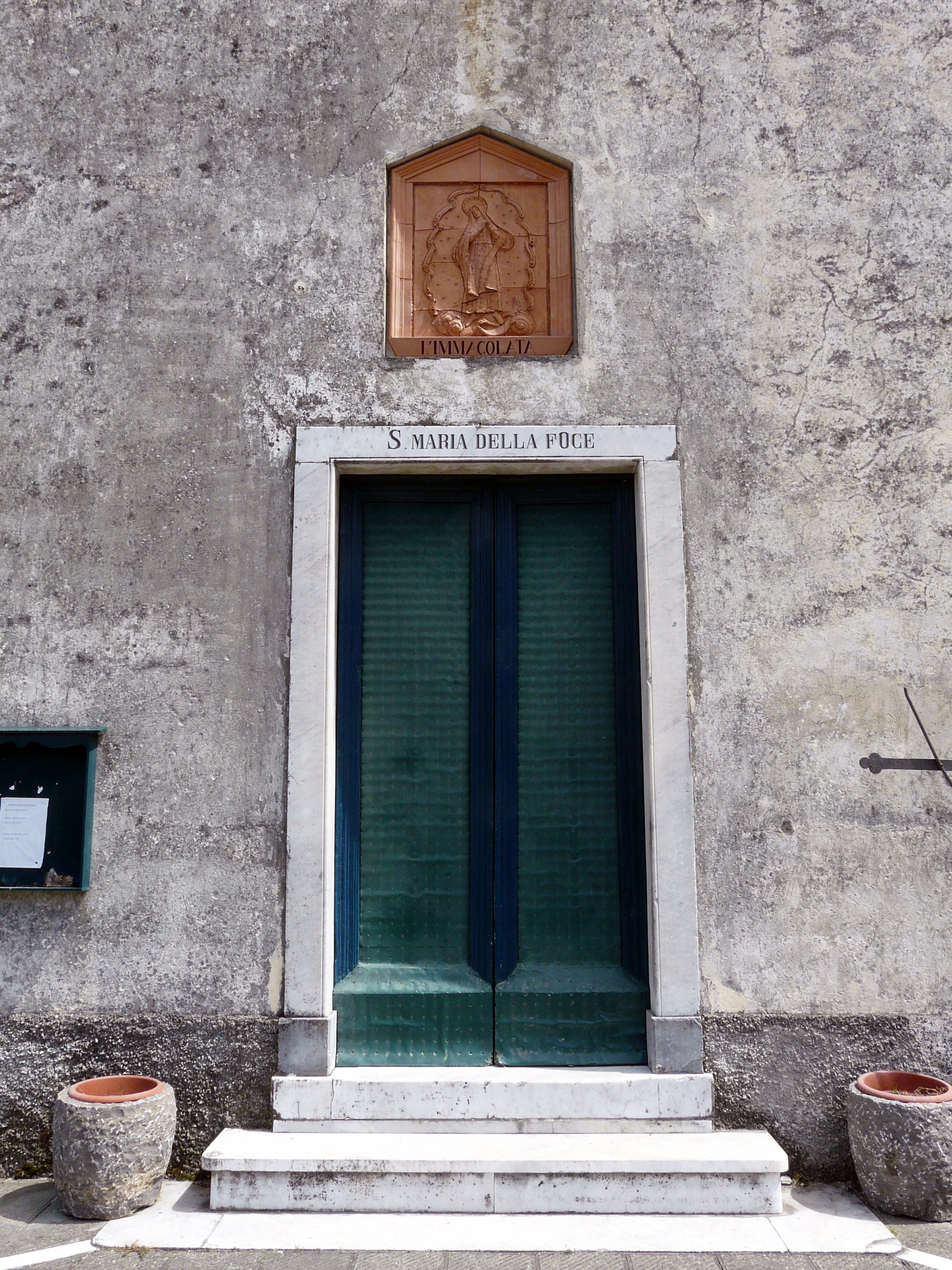 Chiesa di Santa Maria della Foce, Cassana, Borghetto di Vara, Liguria, Italia